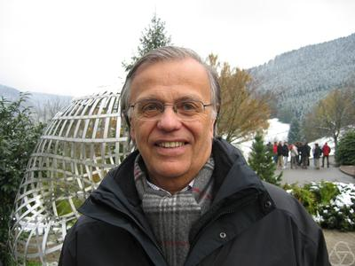 Foto di Gerhard Frey